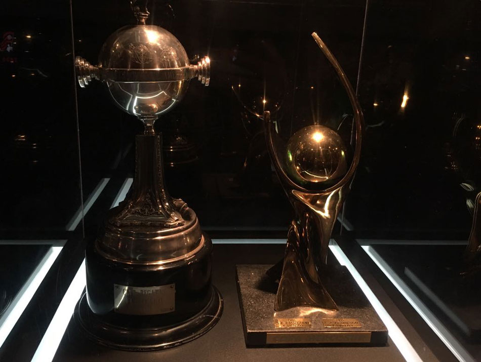 Troféus do Clube de Regatas do Flamengo